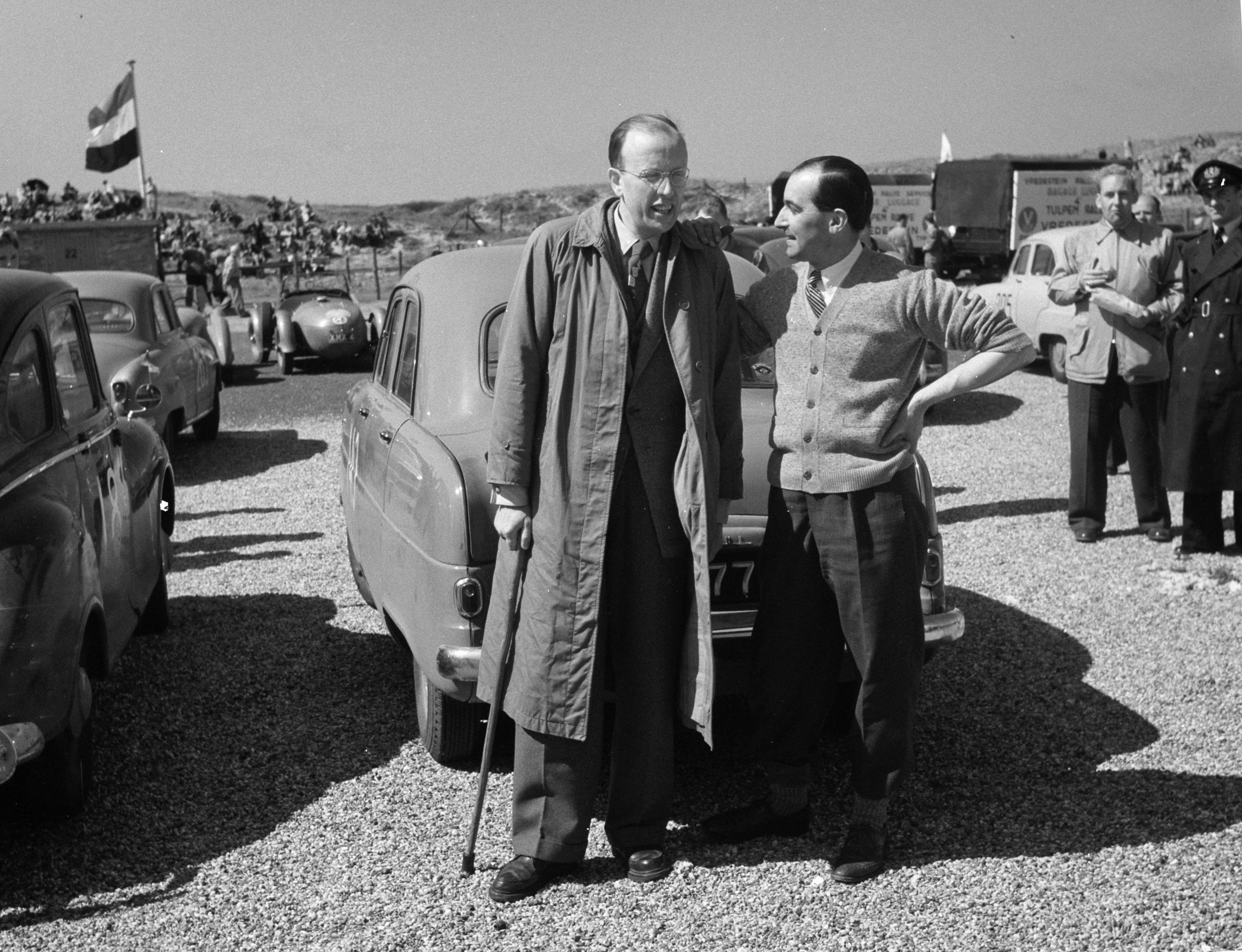 Collectie / Archief : Fotocollectie Anefo Reportage / Serie : [ onbekend ] Beschrijving : Tulpenralley. Snelheidsproef op circuit Zandvoort. Winnaar Ken Wharton met navigator Jan Langelaa (links) Datum : 25 april 1952 Locatie : Noord-Holland, Zandvoort Trefwoorden : autorally's, autosport Persoonsnaam : Langelaan, Jan, Wharton, Ken Instellingsnaam : Tulpenrally Fotograaf : Noske, J.D. / Anefo Auteursrechthebbende : Nationaal Archief Materiaalsoort : Negatief (zwart/wit) Nummer archiefinventaris : bekijk toegang 2.24.01.03 Bestanddeelnummer : 905-0738 Reacties Geplaatst door Maaike op 07 november 2013 - 14:56. Tulpenralley Zandvoort winnaar Kim Wharton en Jan Langelaan (dus geen Laagelaan) Persoonsnamen: Jan J. Langelaan